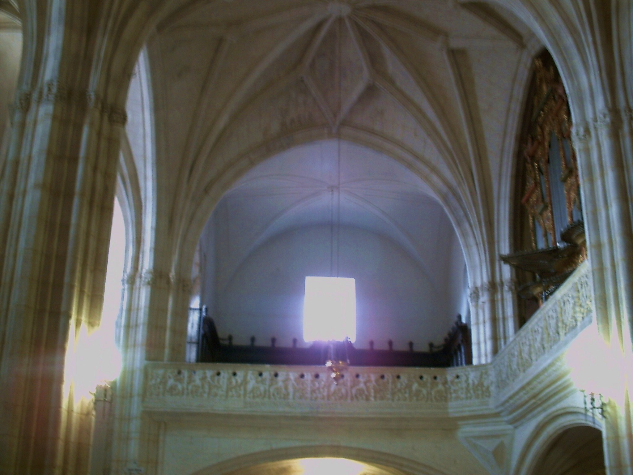 Coro de la Iglesia de San Millán.